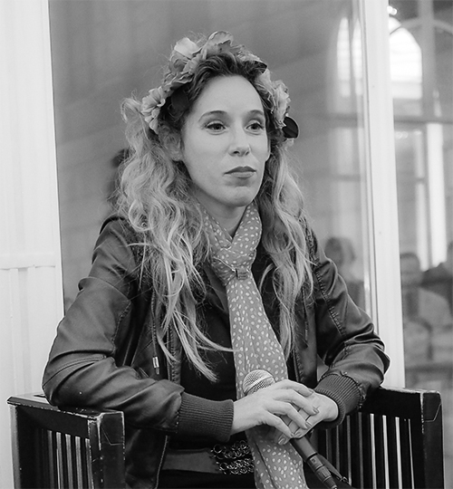 Yael Ronen. Bayerisches Staatsschauspiel, Residenztheater München, Residenzstraße 1, Publikumsgespräch nach dem Gastspiel von "Common Ground" am 3. Oktober 2014.